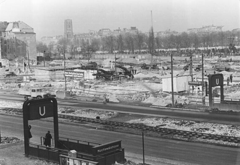 Zentralbild Funck 31.1.1952 Nationales Aufbauprogramm. Zu beiden Seiten der Stalinallee sind die Arbeiten für den Bau der Wohnbaublöcke in vollem Gange. UBz: Blick auf den Bauabschnitt D-Nord.